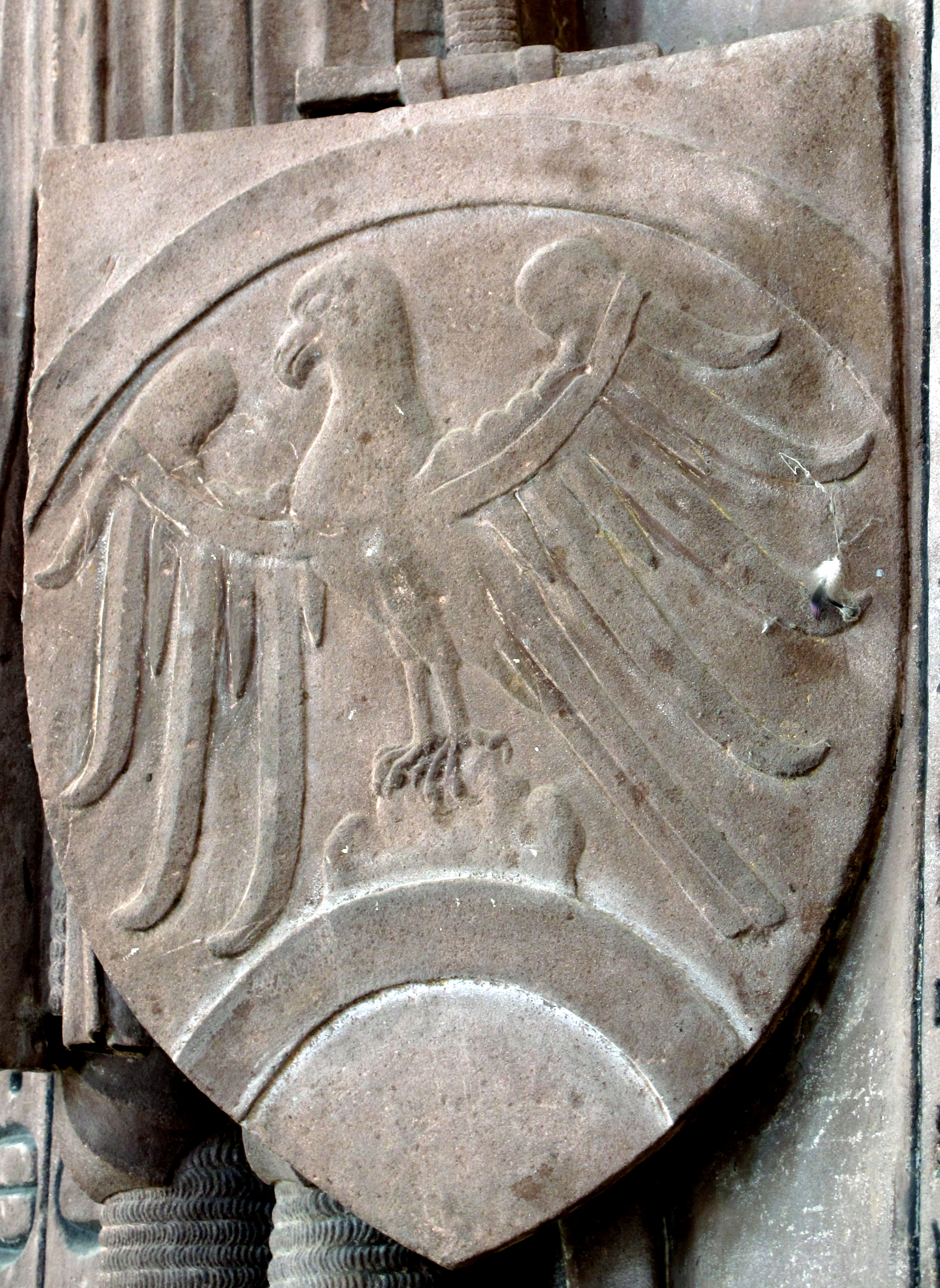 Das Wappen der Falkensteiner - ein emporfliegender blauer Falke zwischen zwei roten Bögen auf goldenem Schild.